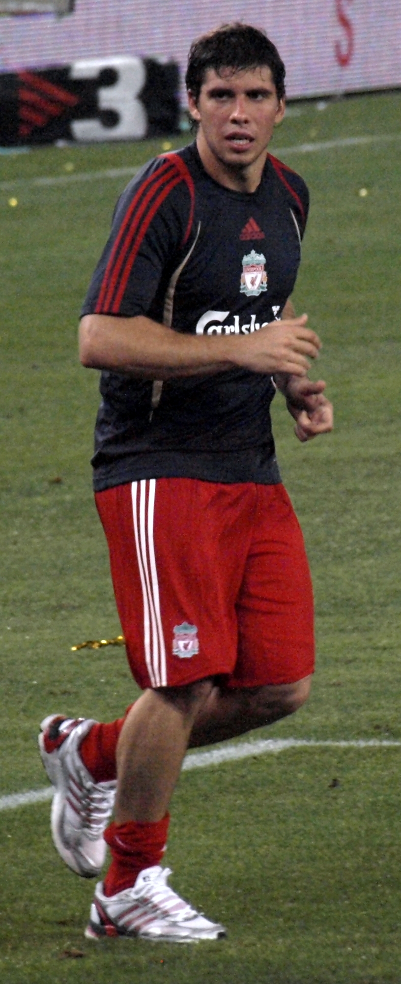 Emiliano Insúa con la camiseta del Liverpool en el partido de presentación del Estadio de Cornella-El Prat disputado ante el RCD Español de Barcelona.